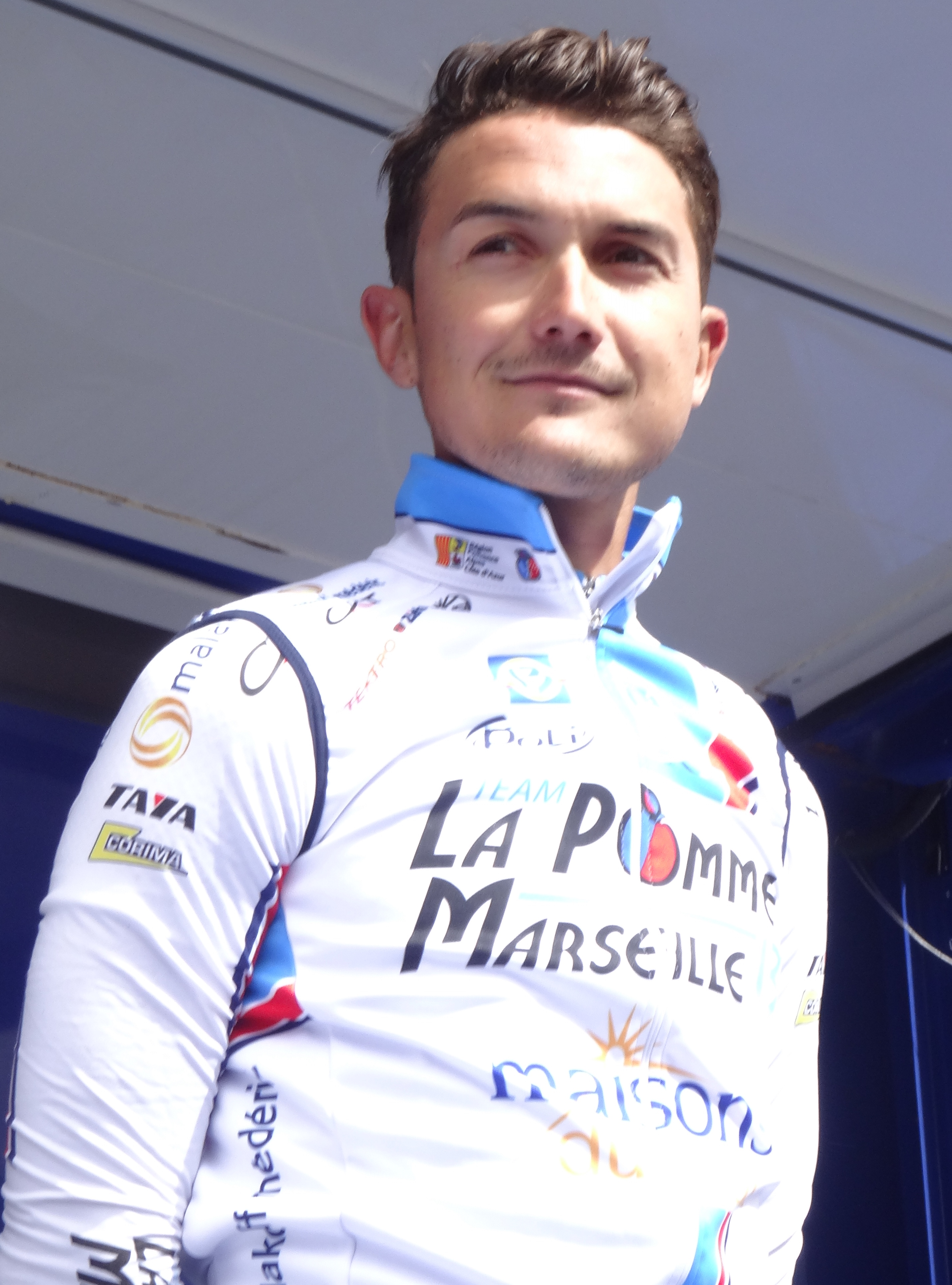 Reportage photographique réalisé le mercredi 7 mai 2014 au départ de la première étape de l'édition 2014 des Quatre jours de Dunkerque à Dunkerque, Nord, Nord-Pas-de-Calais, France. Depicted person: Thomas Rostollan Depicted team: La Pomme Marseille 13